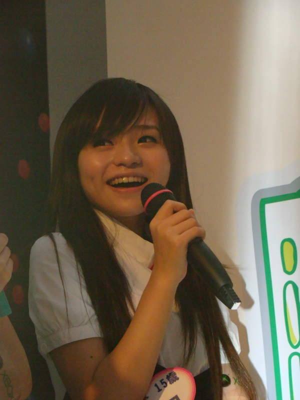 鄭羽婷(糖果)於2008年參與XBOX 360活動